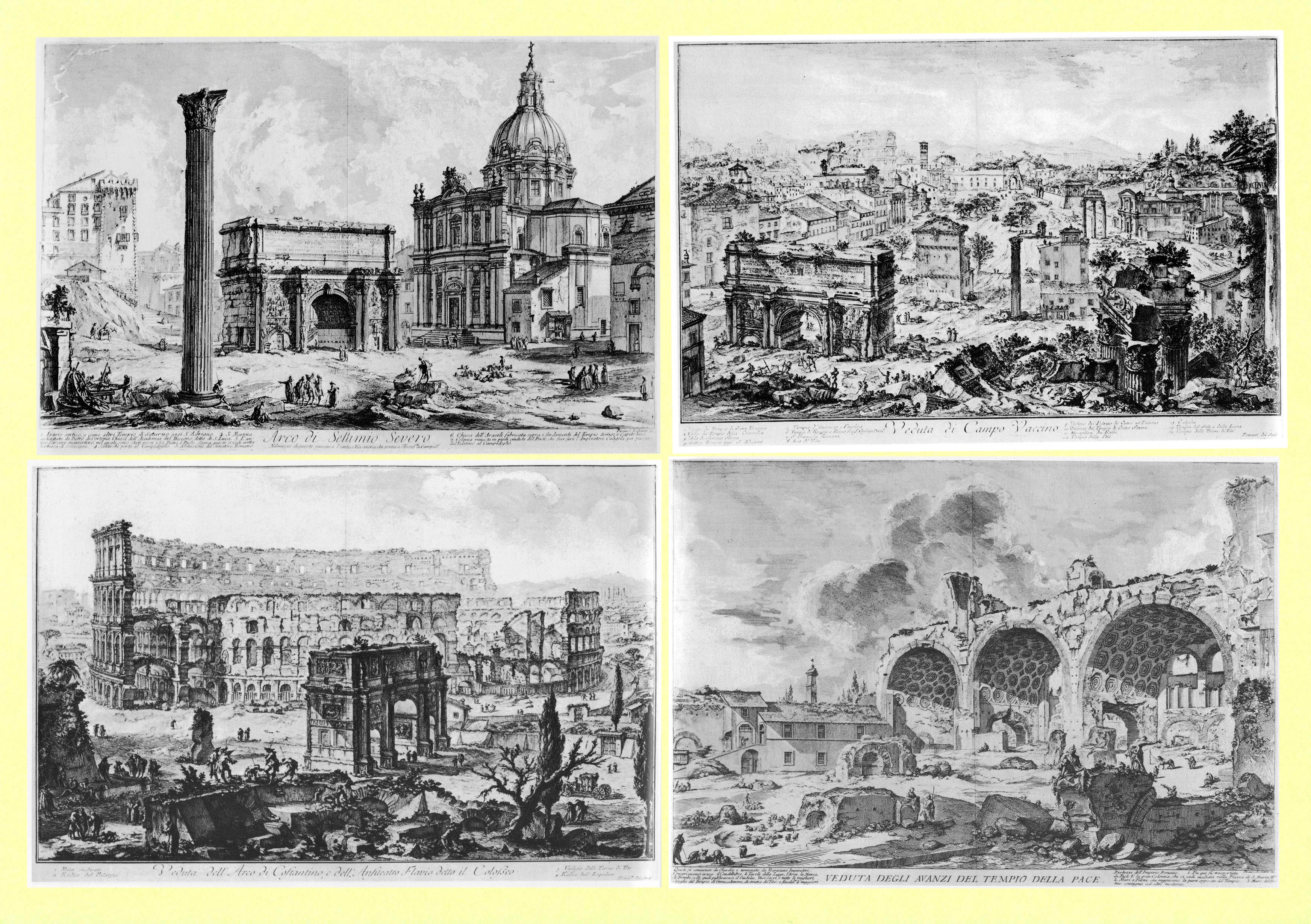 Piranesi vedutái